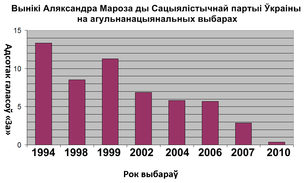 Вынікі Аляксандра Мароза і СПЎ на выбарах. Беларуская (тарашкевіца): Вынікі Аляксандра Мароза і СПЎ на выбарах.